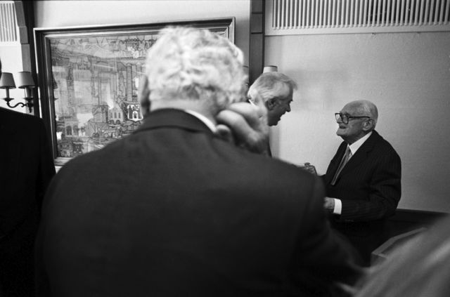 Theodor Maunz am 01. September 1991 bei der Feier seines 90. Geburtstags im Würmtaler Gästehaus in Gräfelfing (Bayern). Theodor Maunz war Jurist, Hochschullehrer, Publizist (u.a.: National-Zeitung), Bayrischer Kultusminister (1957 bis 1964) Teilnehmer am Verfassungskonvent auf Herrenchiemsee, „Nestor“ des Grundgesetzes der Bundesrepublik Deutschland. Veröffentlicht in: Münchner Merkur Nr. 202, Montag, 2. September 1991, Seite W1. 40 Gäste, meist Richter und Professoren auf dem Geburtstagsempfang im Würmtaler Gästehaus u.a. der damalige Präsident des Bundesverfassungsgerichts, Roman Herzog